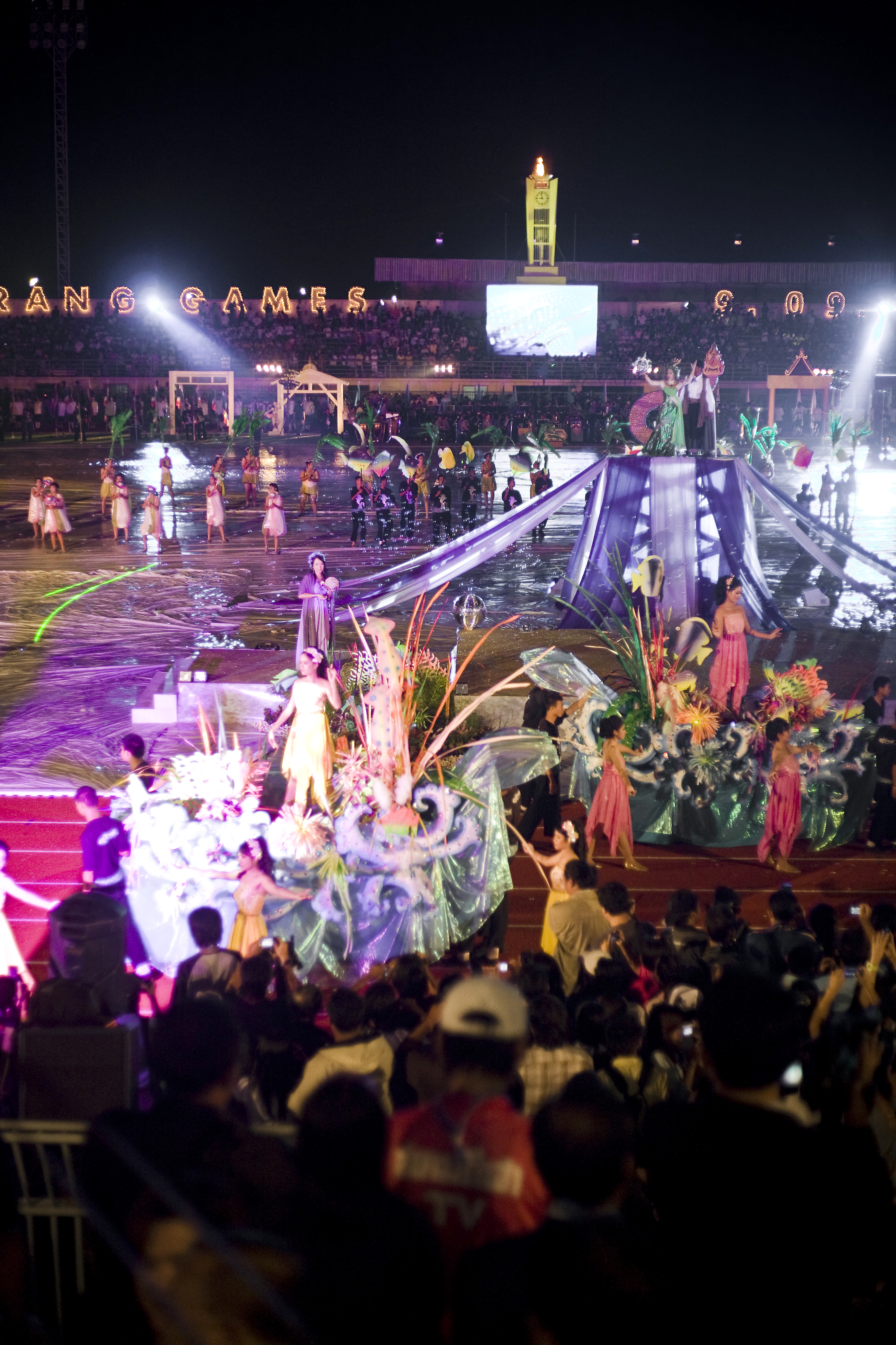 นายกรัฐมนตรี เป็นประธานเปิดการแข่งขันกีฬาแห่งชาติ "ตรังเกมส์" ครั้งที่ 38 ณ สนามกีฬาจังหวัดตรัง 9กันยายน2552 (The Official Site of The Prime Minister of Thailand Photo by พีรพัฒน์ วิมลรังครัตน์)